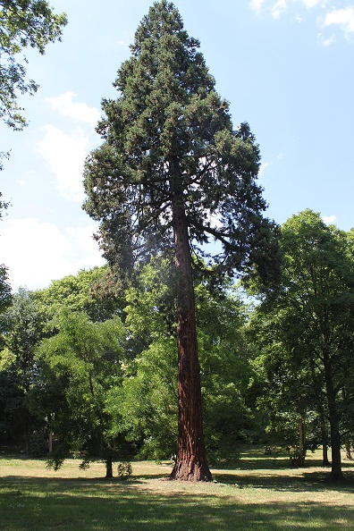 Séquoïa géant, venant de la côte Ouest des Etas-Unis, planté dans le désert de Retz.